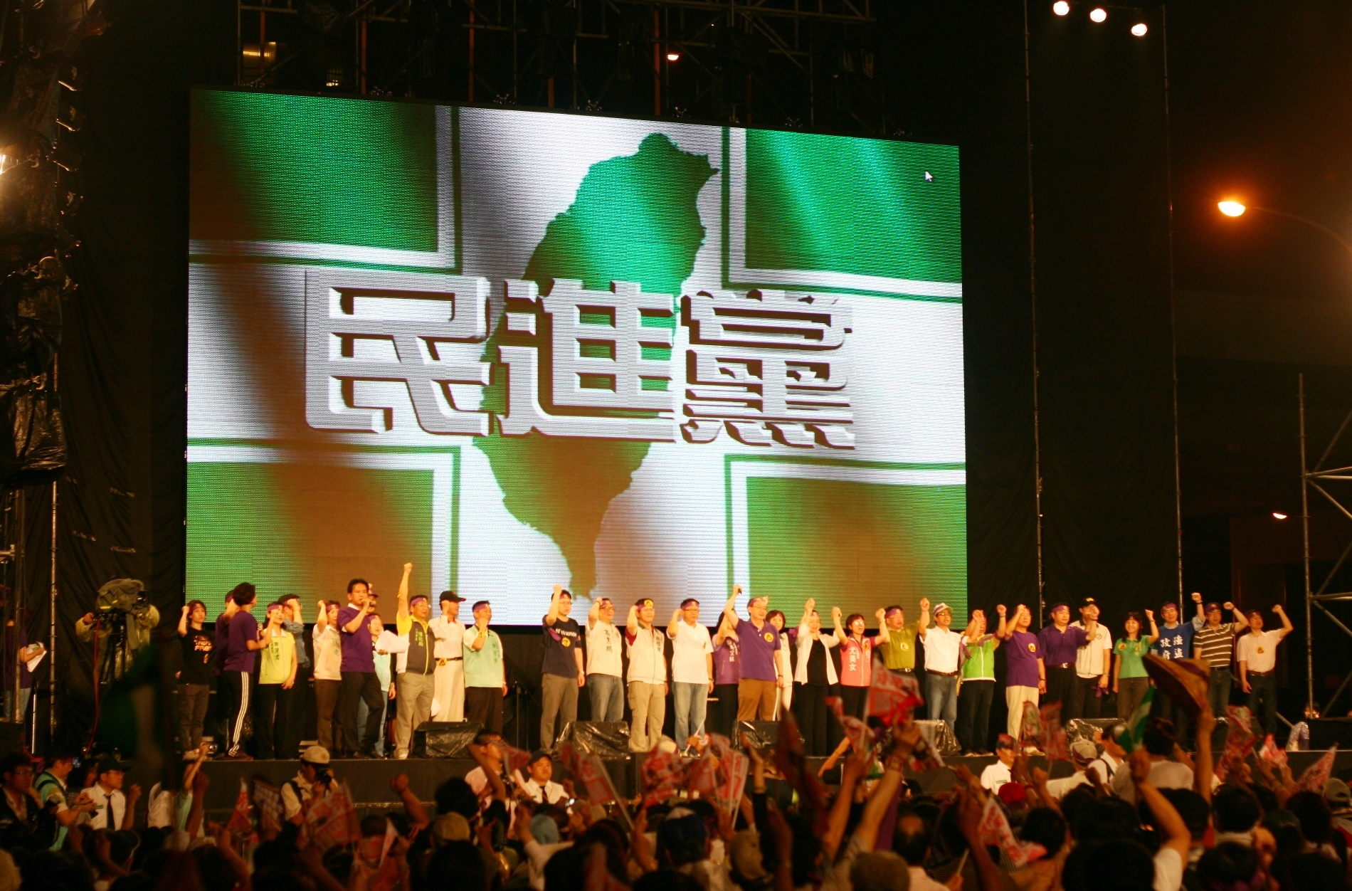 馬英九第二任總統就職前夕